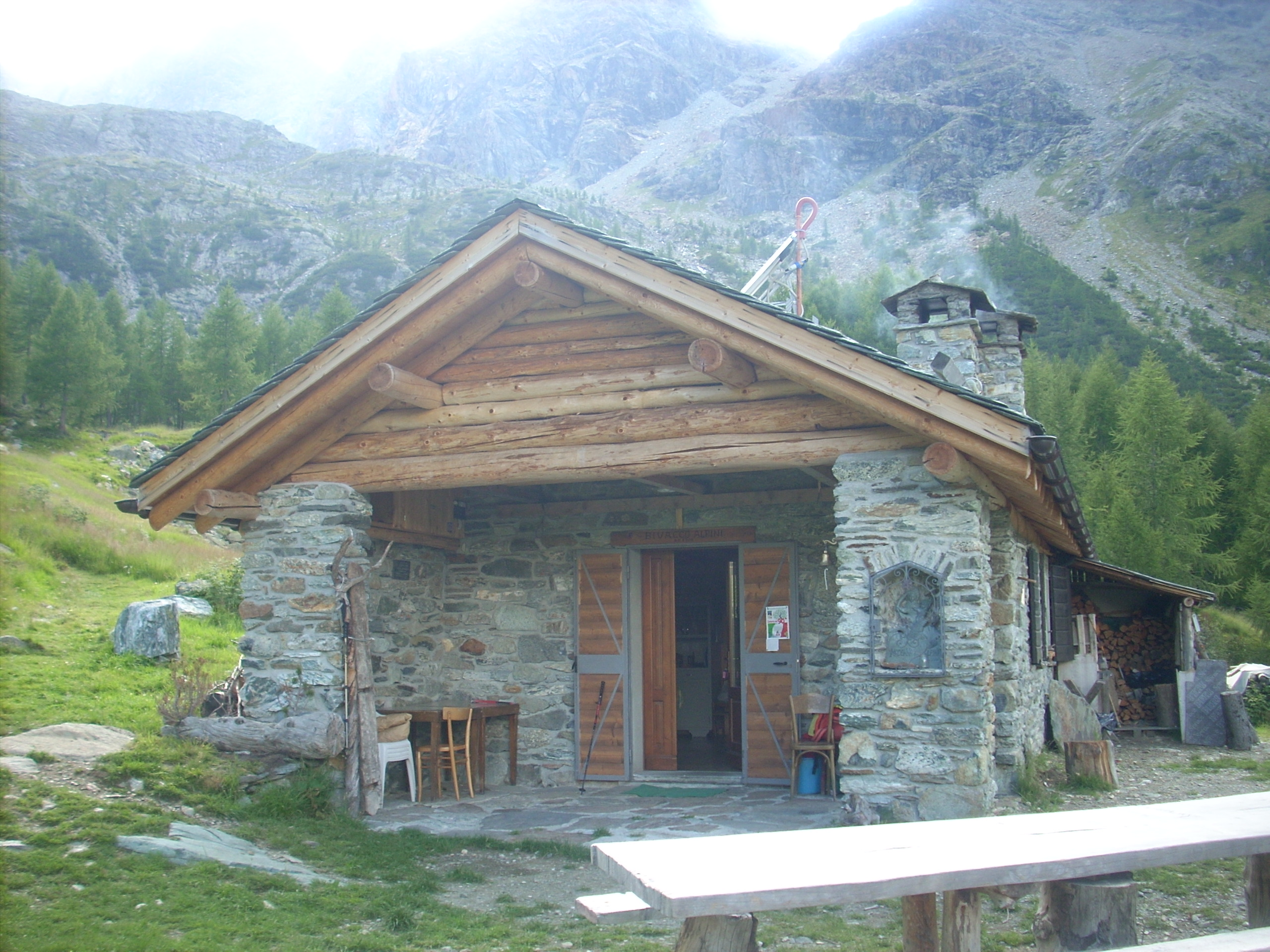 BAITA DEGLI ALPINI "LA GAZZUOLO"